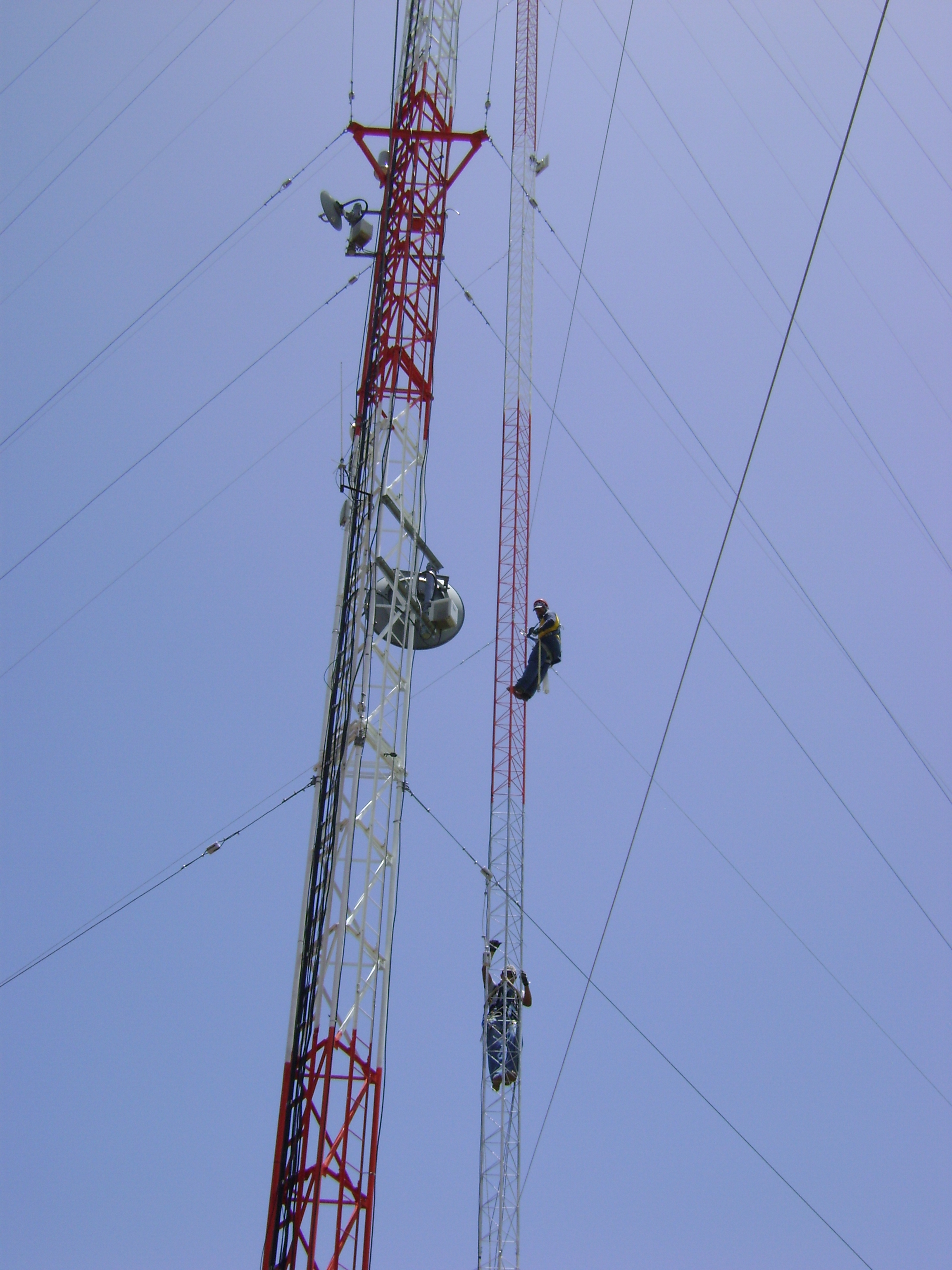 Subiendo a una torre, para instalación de equipo